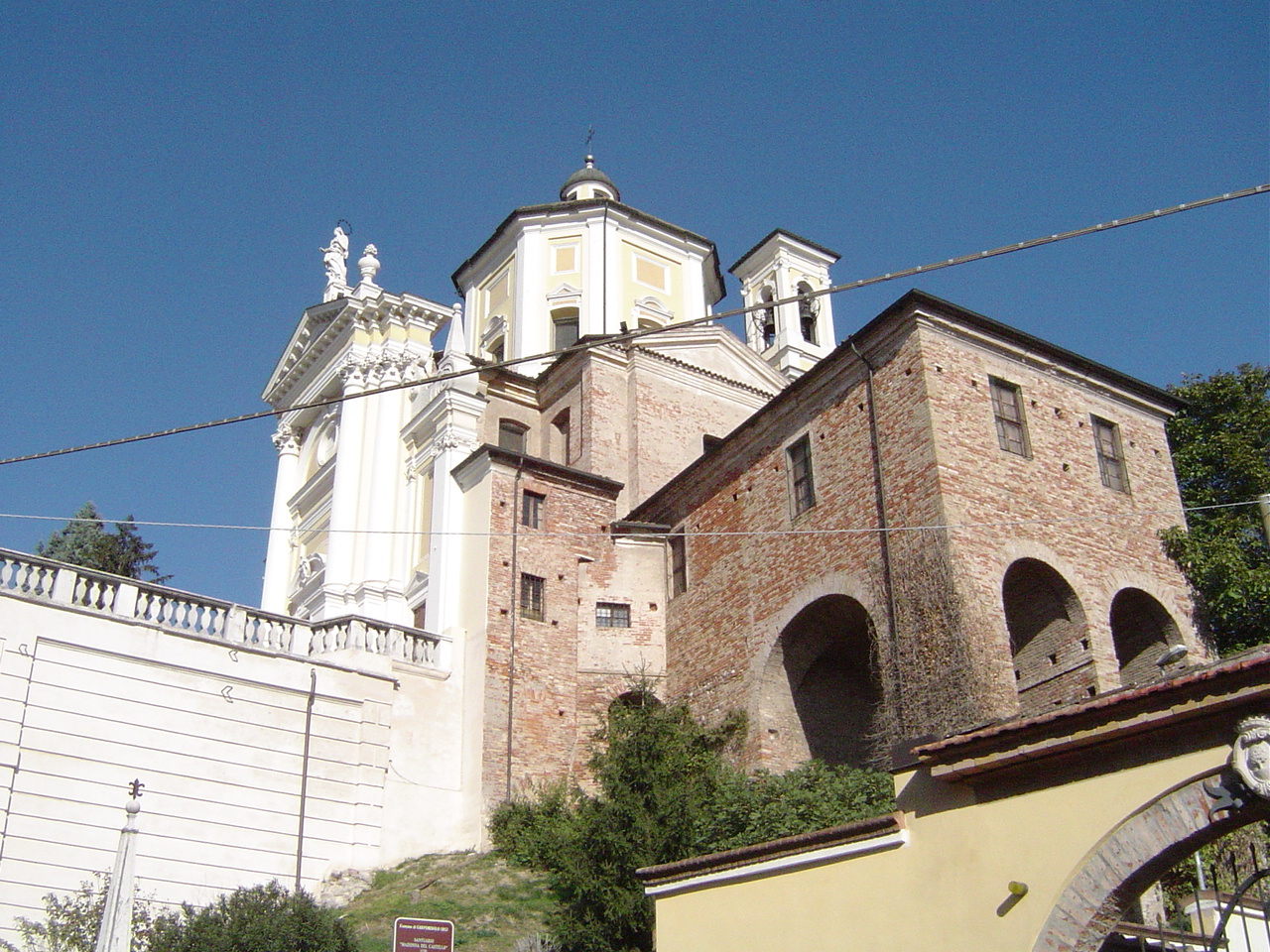 Santuario della Madonna del Castello a Carpenedolo.